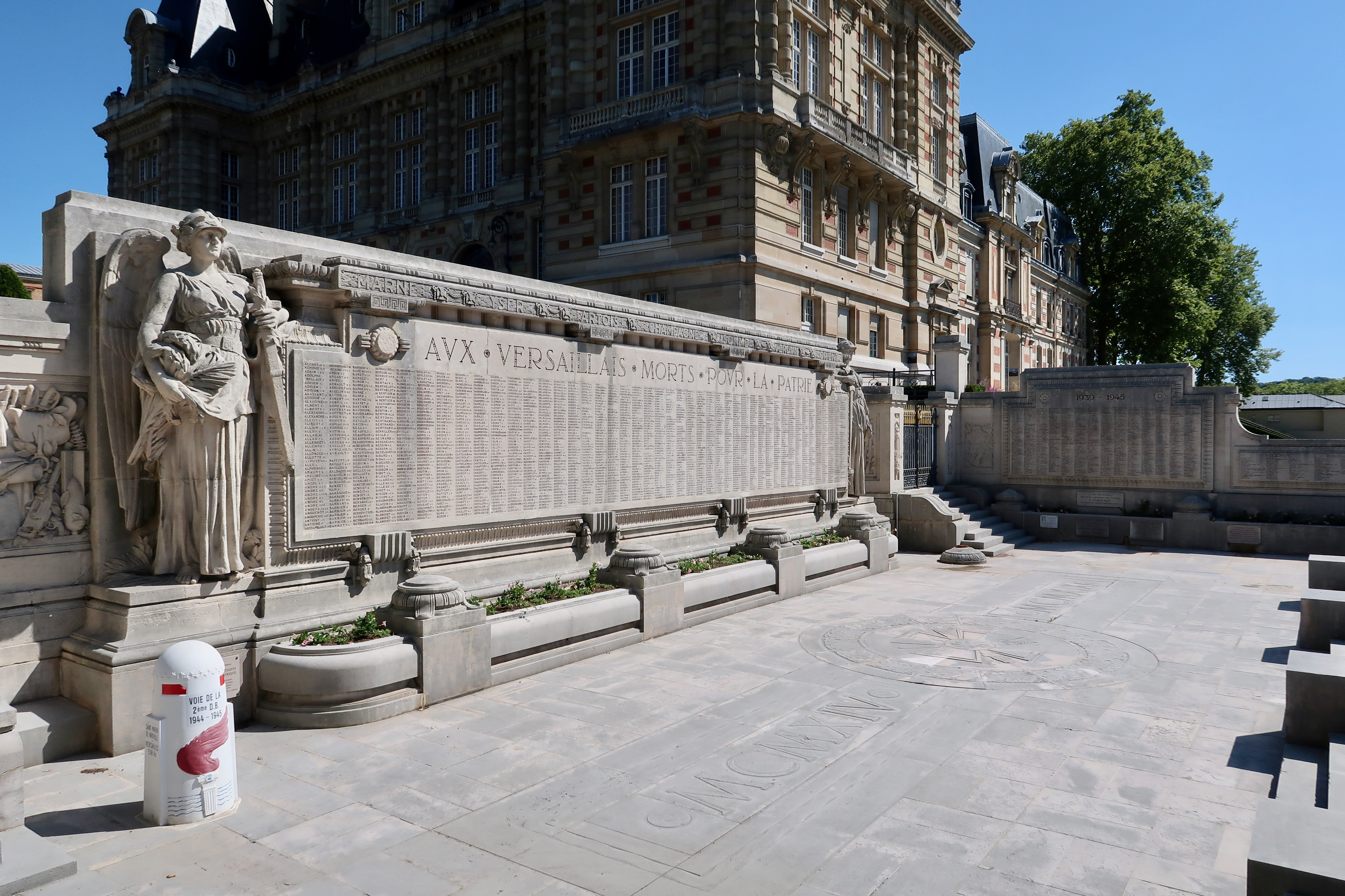 Monument aux morts de Versailles, à côté de l'hôtel de ville.